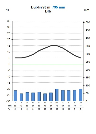 Dublini kliimadiagramm